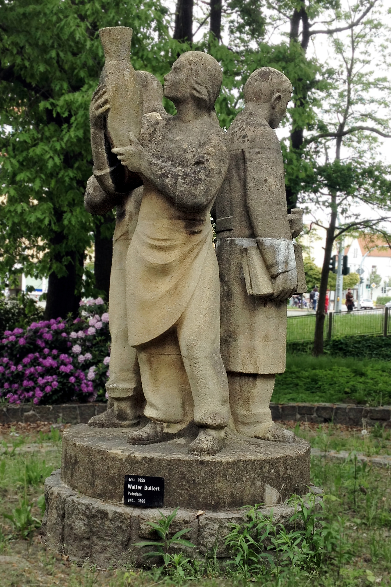 Die Figurengruppe aus dem Jahr 1955 zeigt drei Arbeiter der Glasindustrie, hier im Vordergrund eine Mitarbeiterin des Vertriebs. Das Denkmal steht vor der früheren Ingenieurschule für Glastechnik der DDR in Weißwasser.